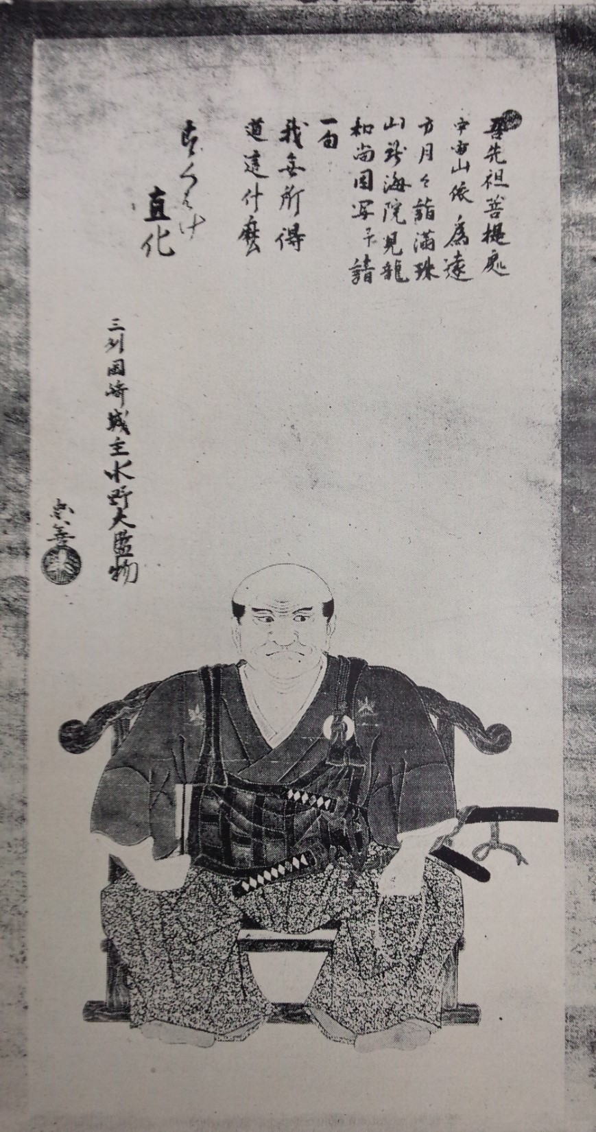 水野忠善の肖像。